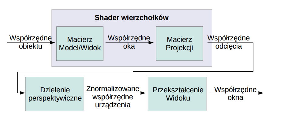 Diagram przedstawiający kolejność przekształceń/działań na wieszadełkach obiektów wyświetlanych.